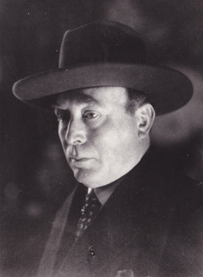 Portret Schilder Edmond De Maertelaere